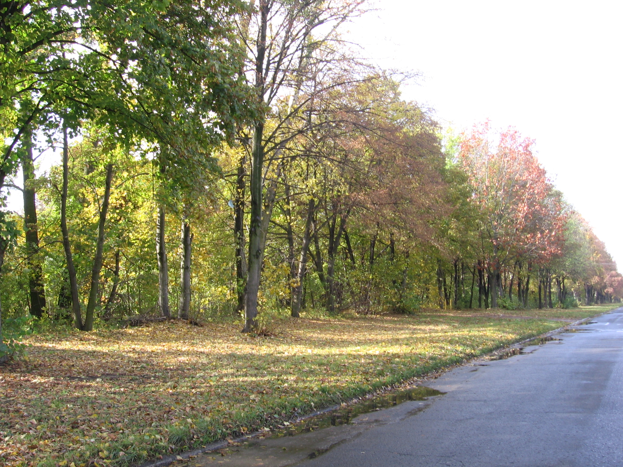 Siedlec we Wrocławiu: Las Rakowiecki z ul. Międzyrzeckiej